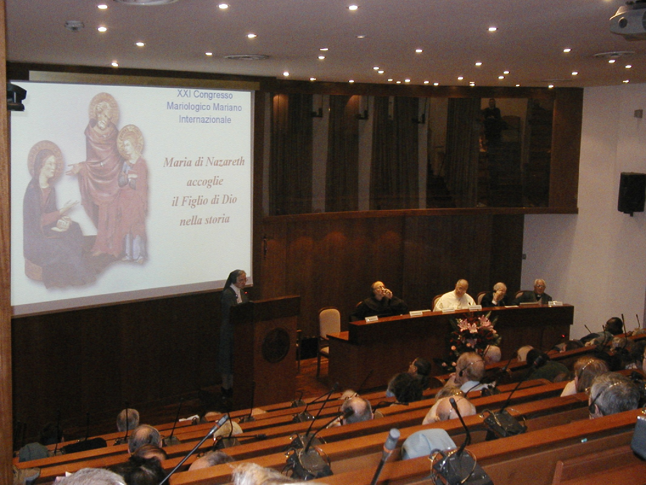 Roma 2004